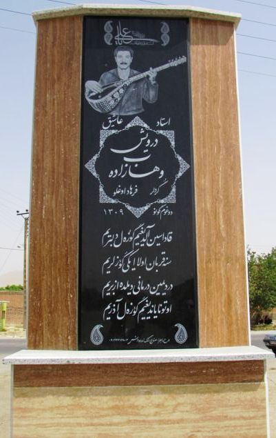 تۆرکجه: آشیق درویش‌ین آنیتی-کورتلر کندی